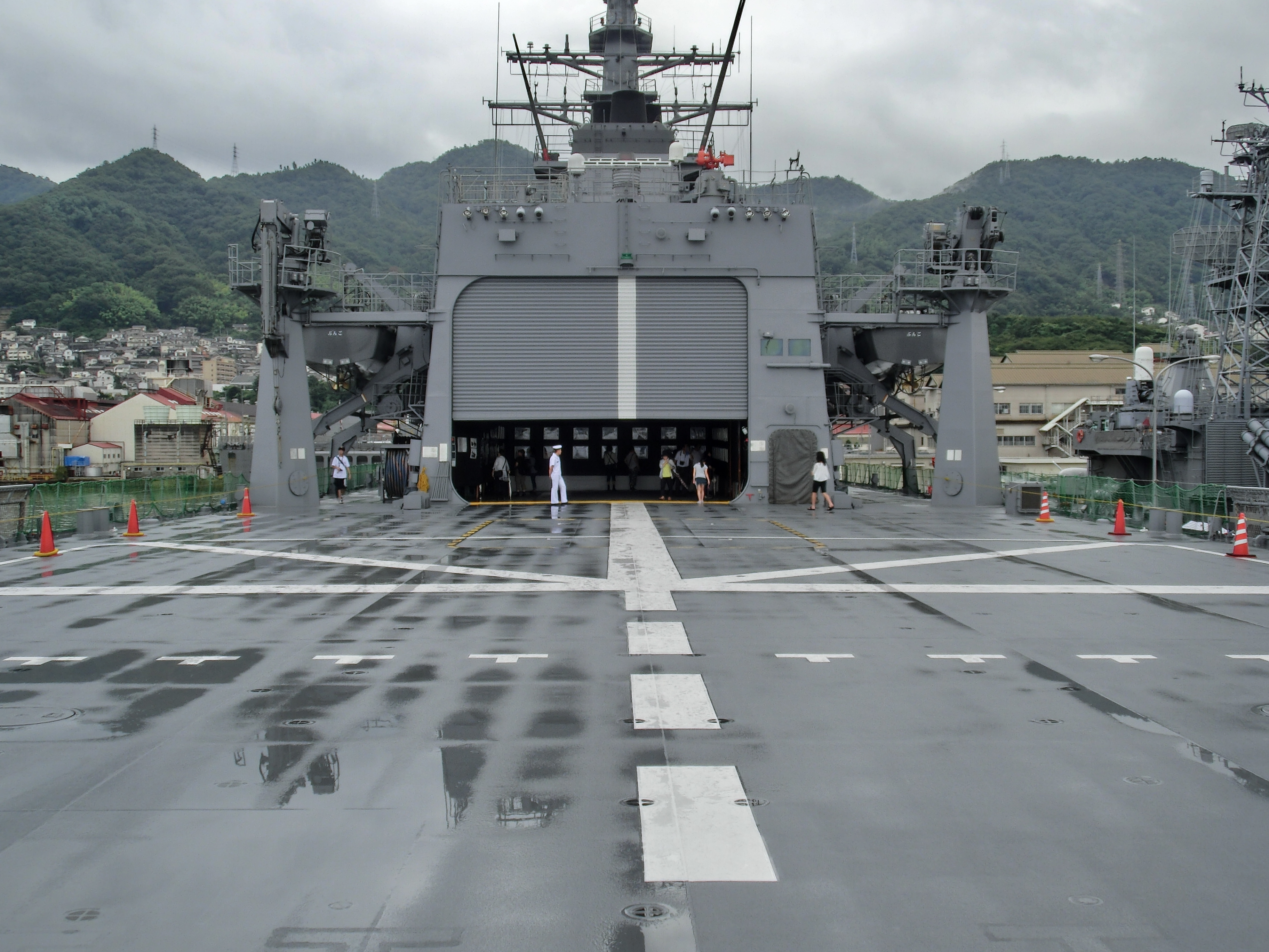 掃海母艦 ぶんごの後部甲板。呉基地で撮影。